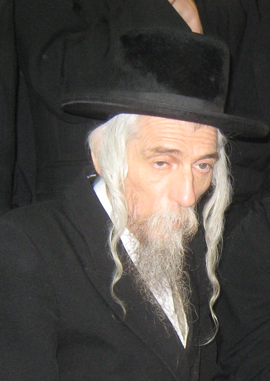 האדמו"ר מסטריקוב - בני ברק